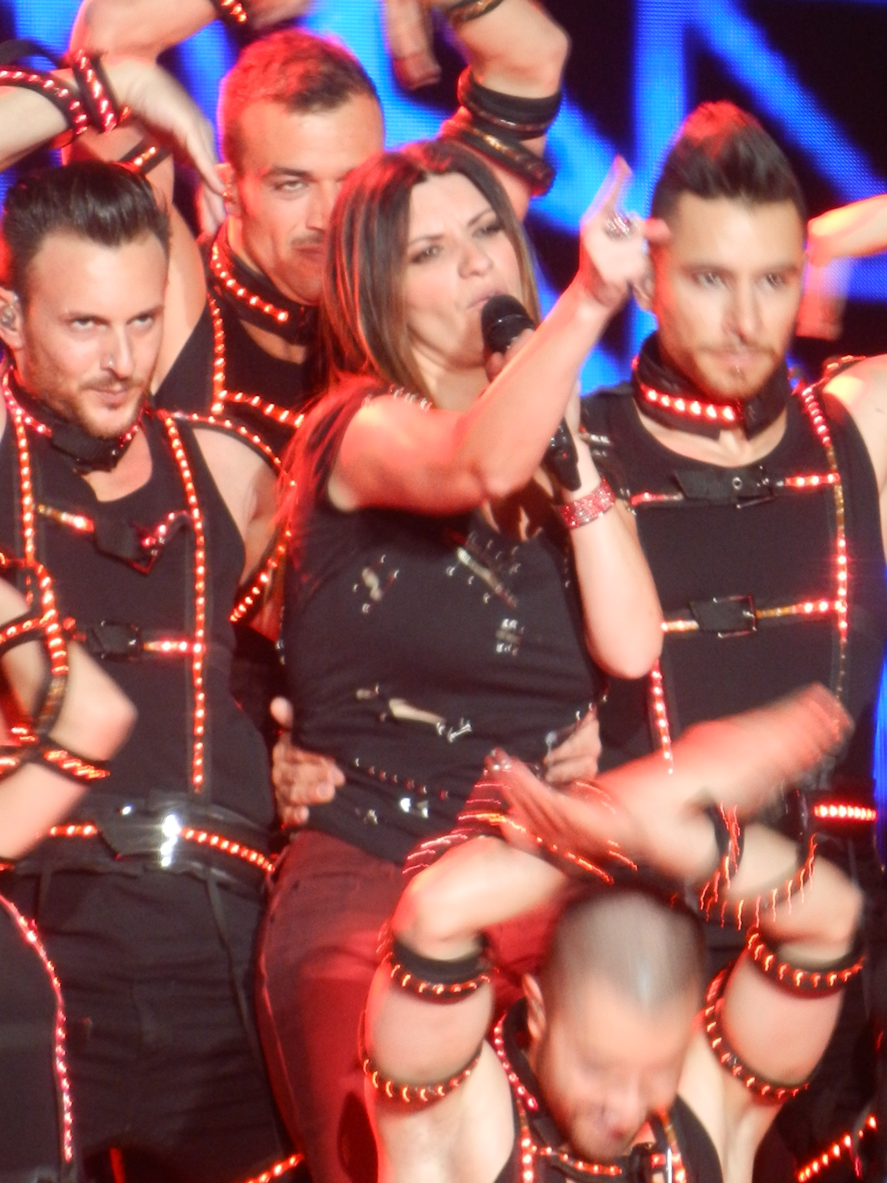 Laura Pausini 07 - Bercy - Avril 2012